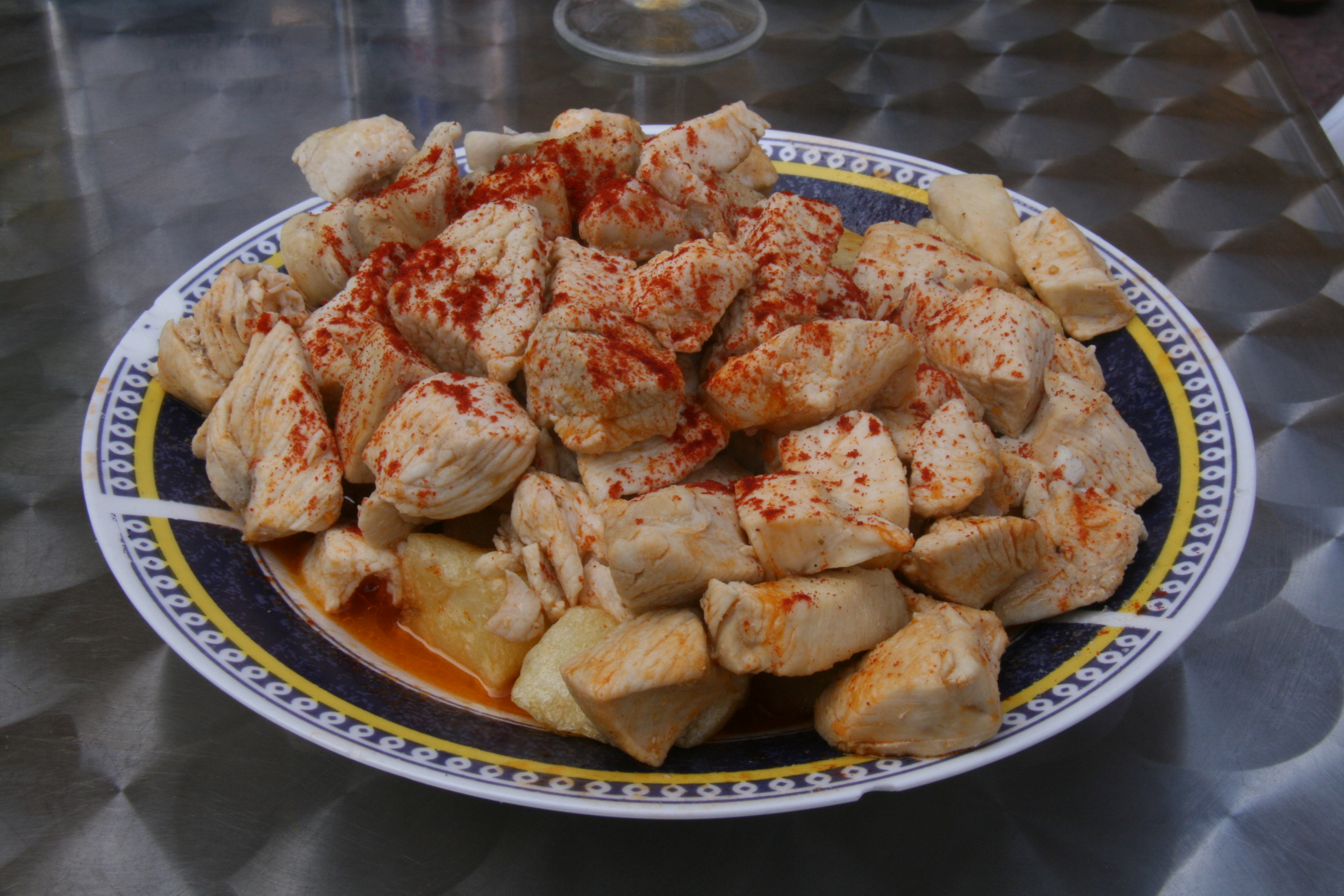 Ración de pollo con patatas